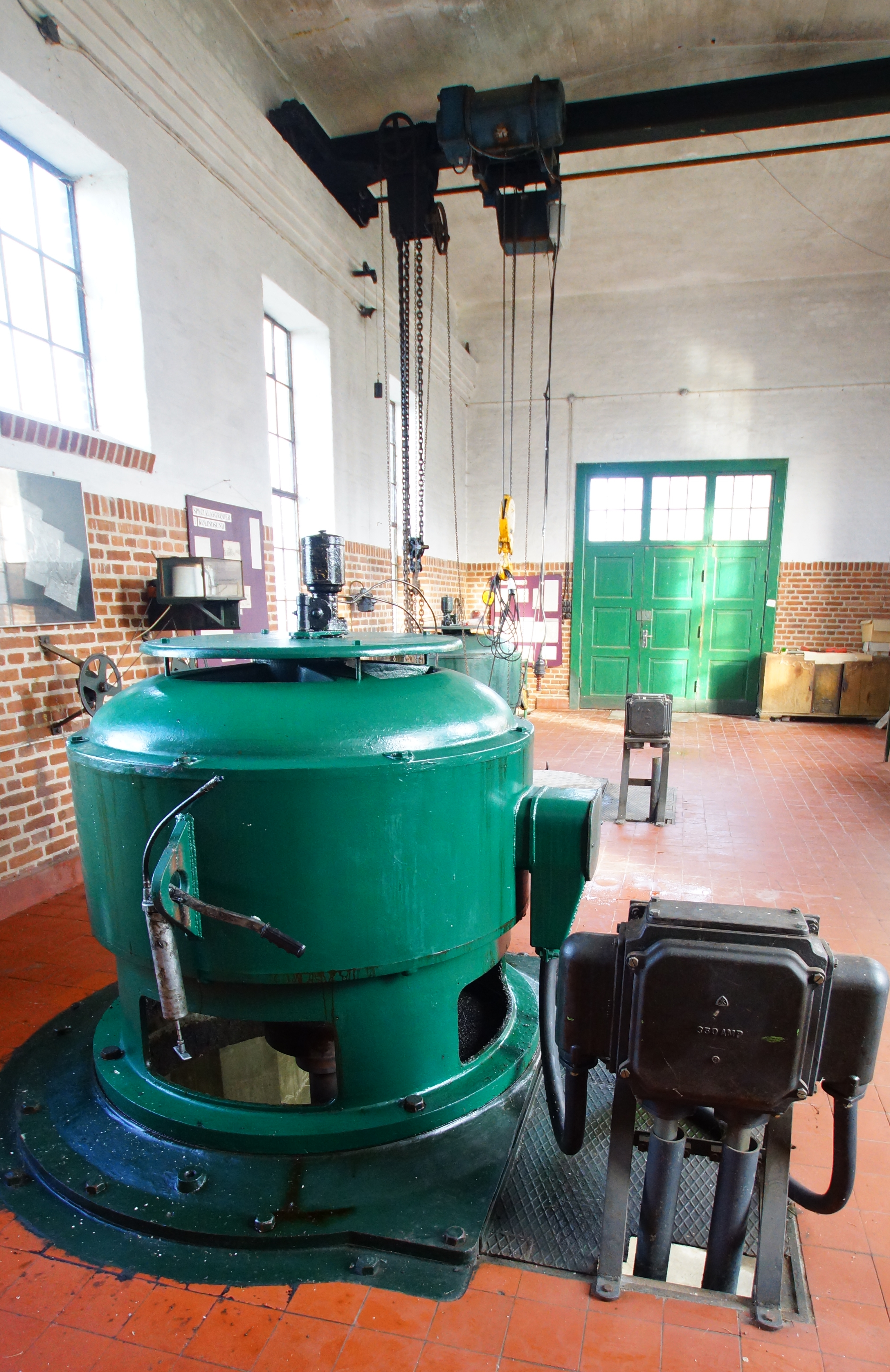 Kolindsund, 240 HK pumpemotor, Fannerup Pumpestation